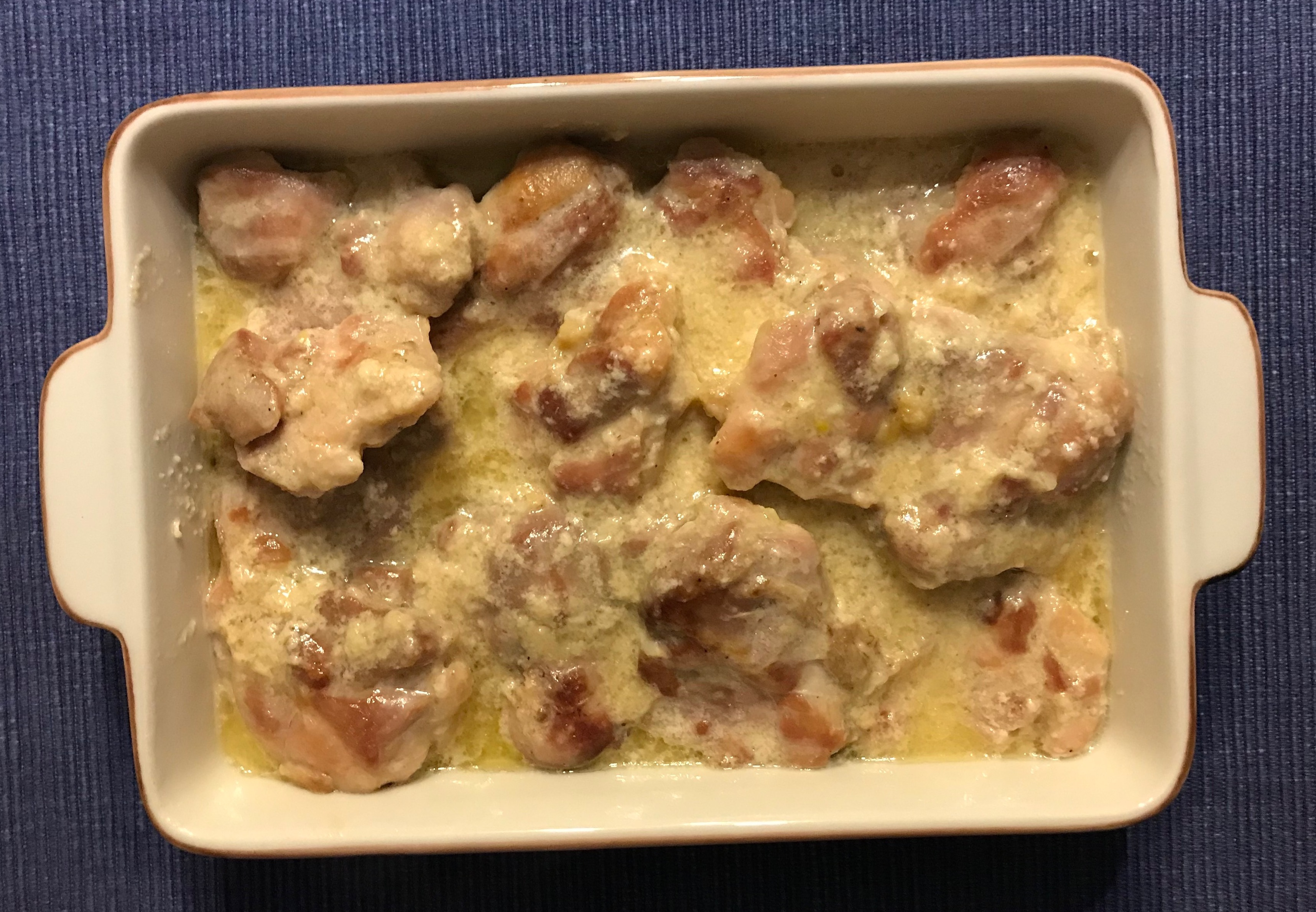 Evde yapılmış şkmeruli...